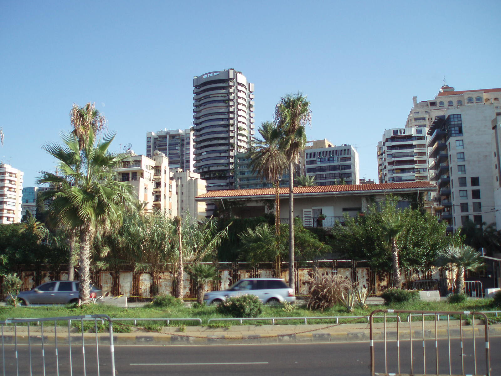 Beirut lebanon 031